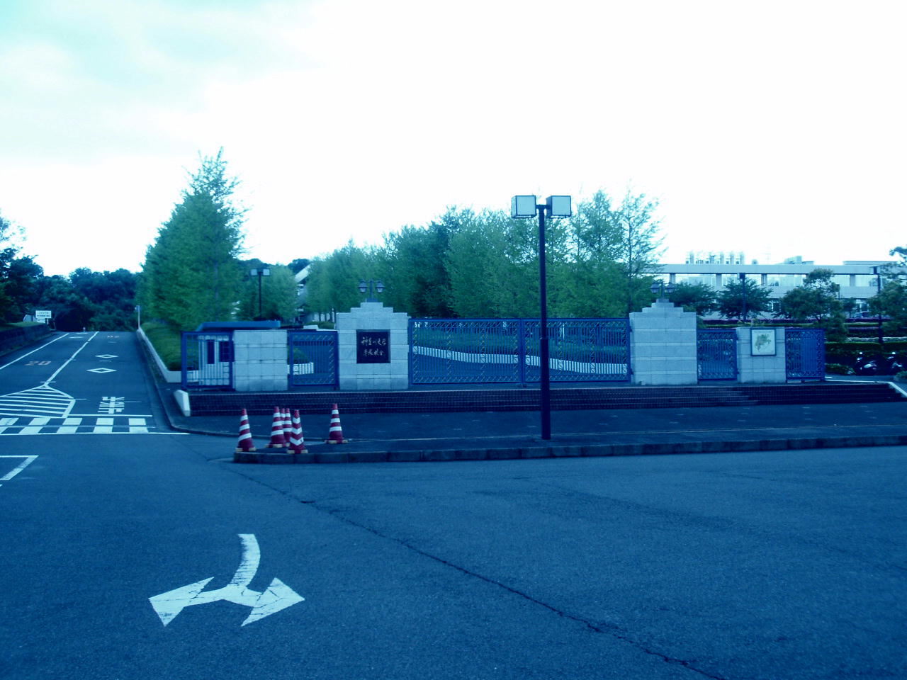 Kanagawa Univ. Shonan-Hiratsuka Campus Gate